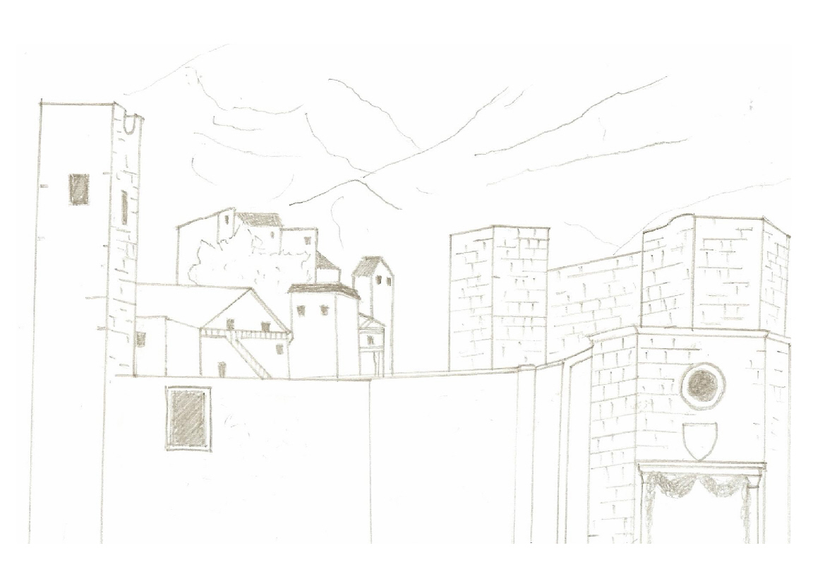 Décor d'une représentation de Luisa Miller, dessin de Vallzoulou